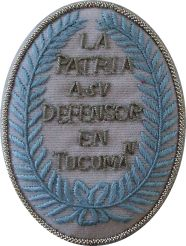 Escudo honorífcio otorgado a las tropas victoriosas en la Batalla de Tucuman